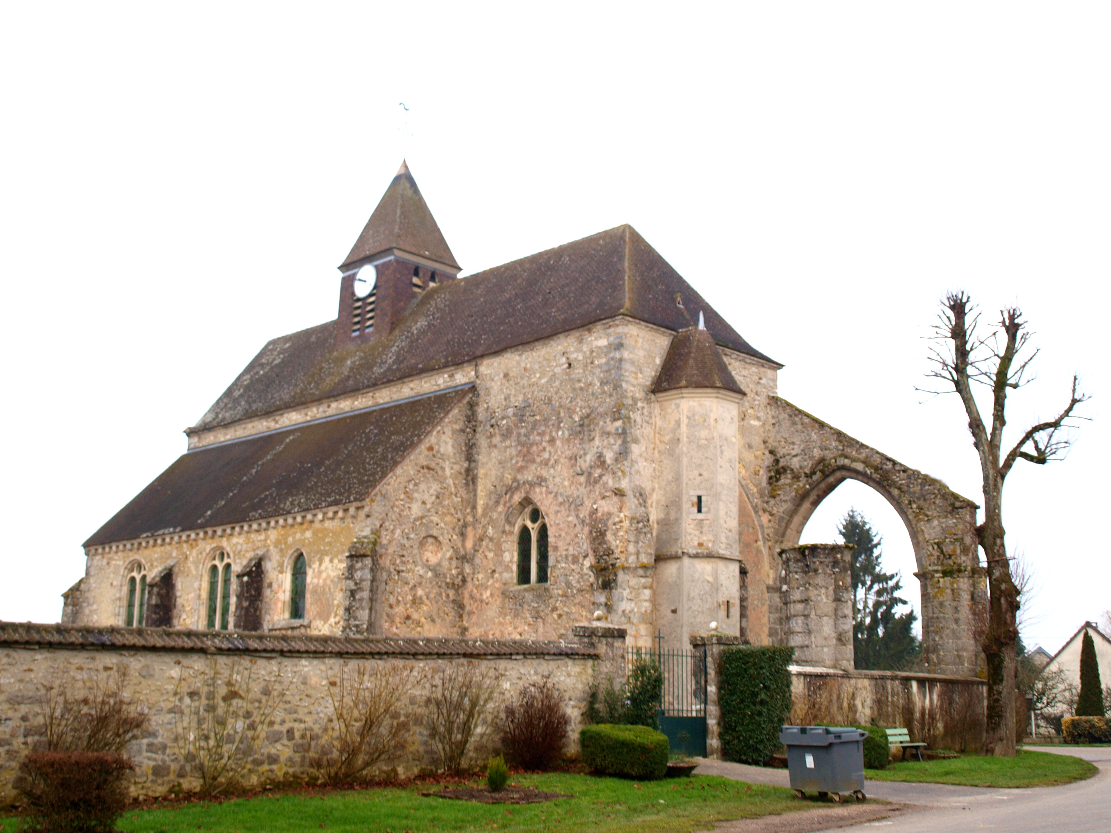 Charleville (Marne, France) ; église